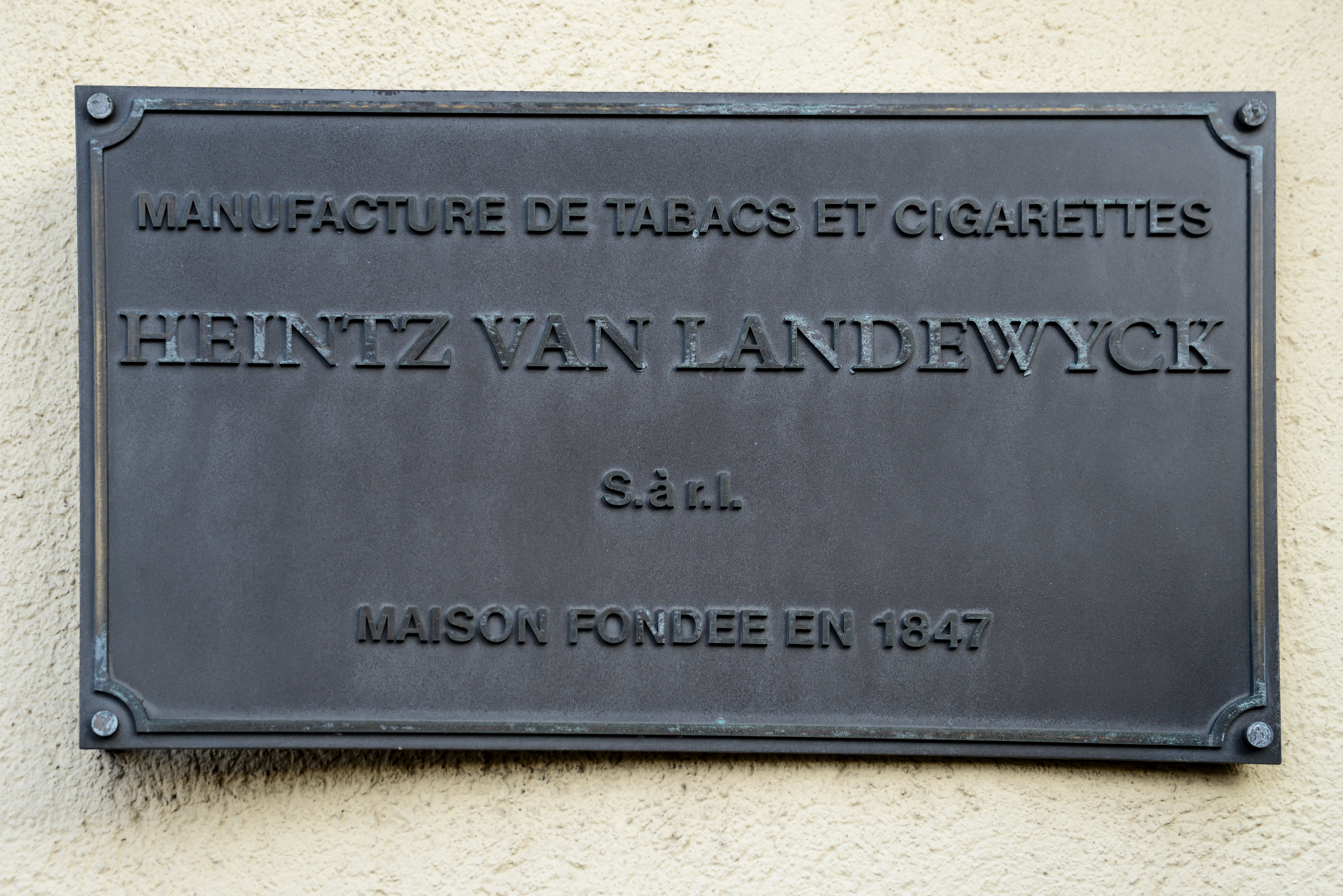 An der Hollerecherstrooss op der Gare.